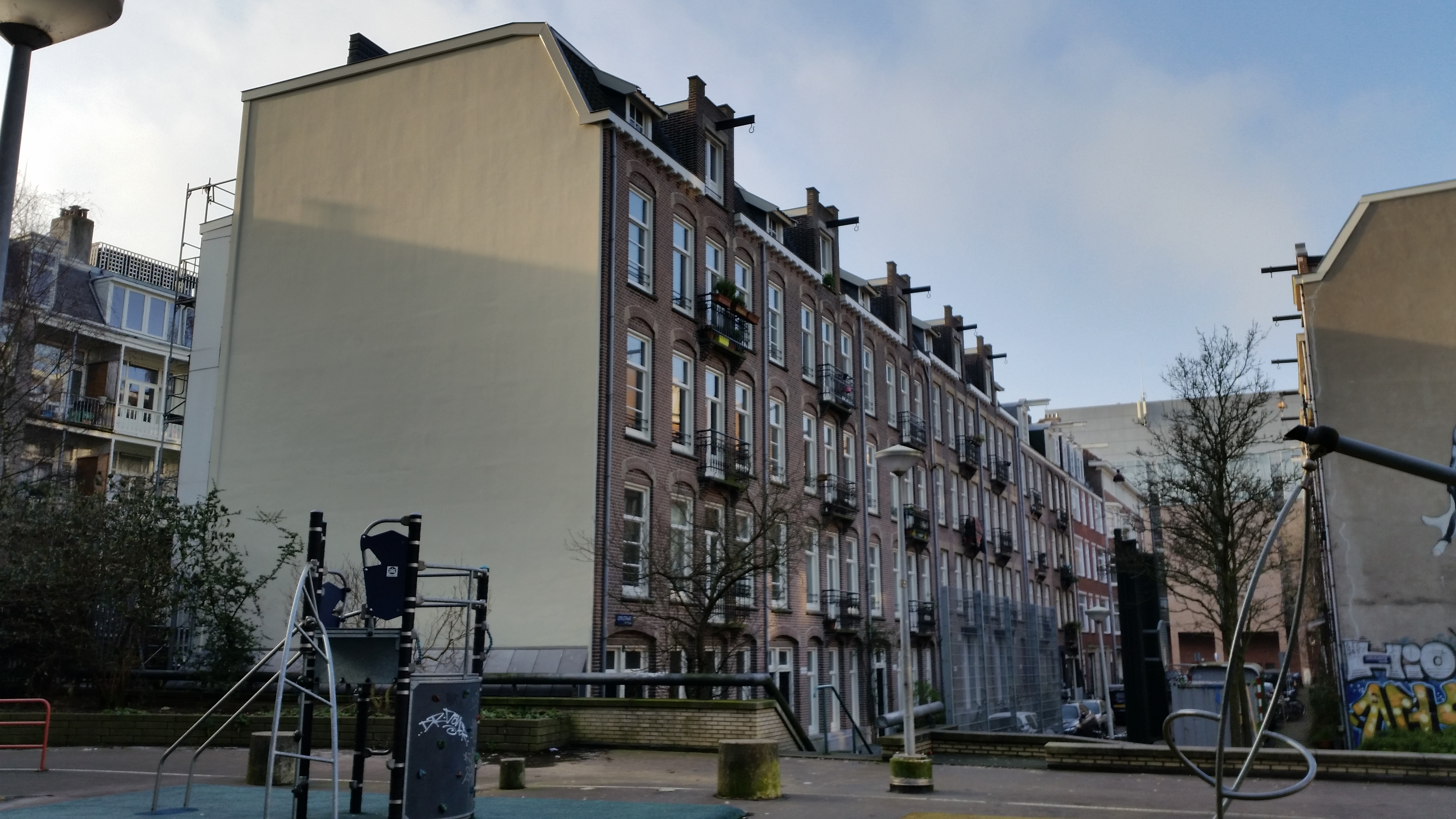 Impressie van de Lepelstraat, Amsterdam-Centrum in 2020